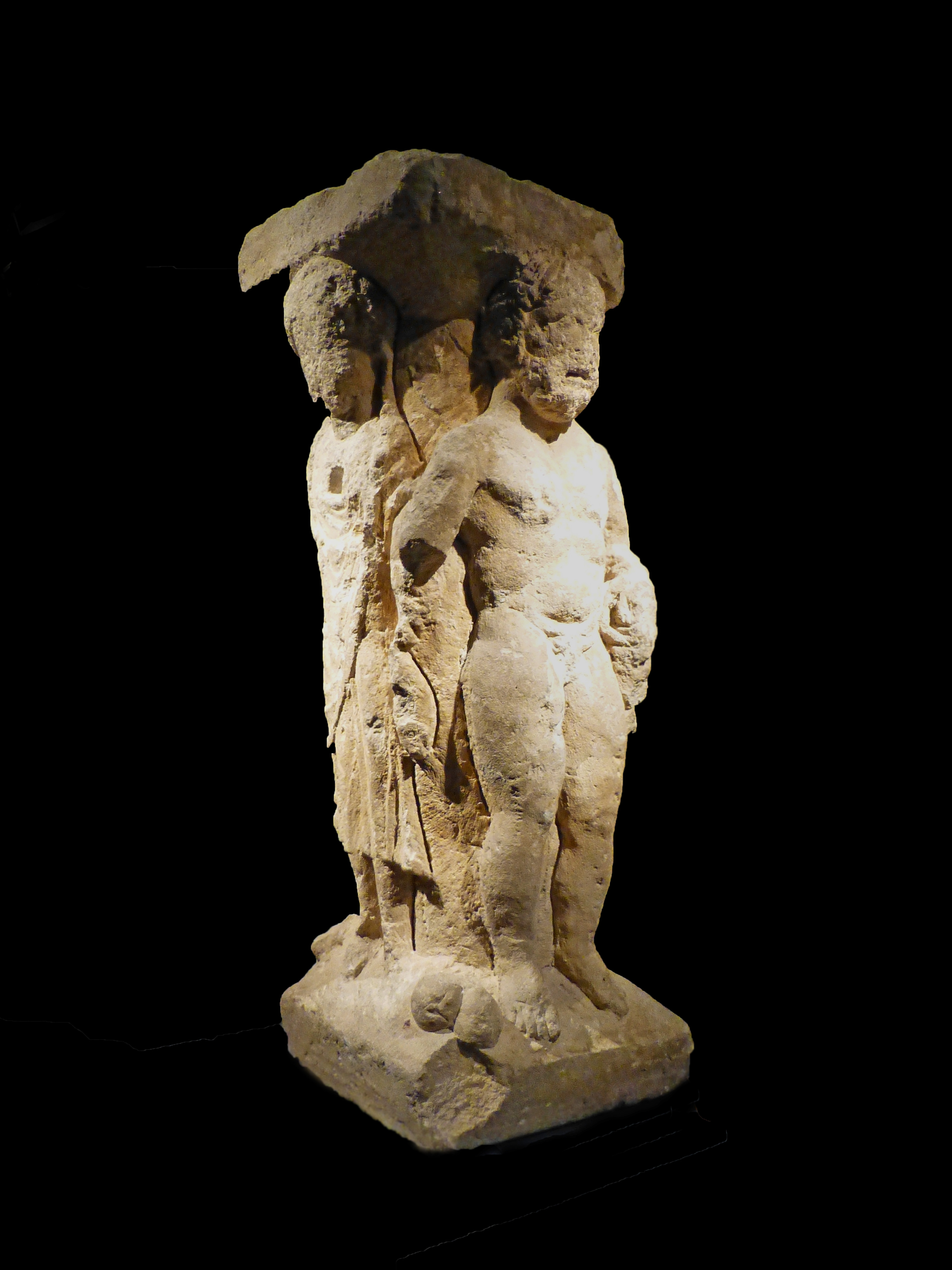 Autel romain à quatre dieux : Hercule, divinité chasseresse, Vénus, Junon. Ier siècle. Calcaire. Découvert en 1821 à Lamerey. Musée départemental d'art ancien et contemporain d'Epinal.